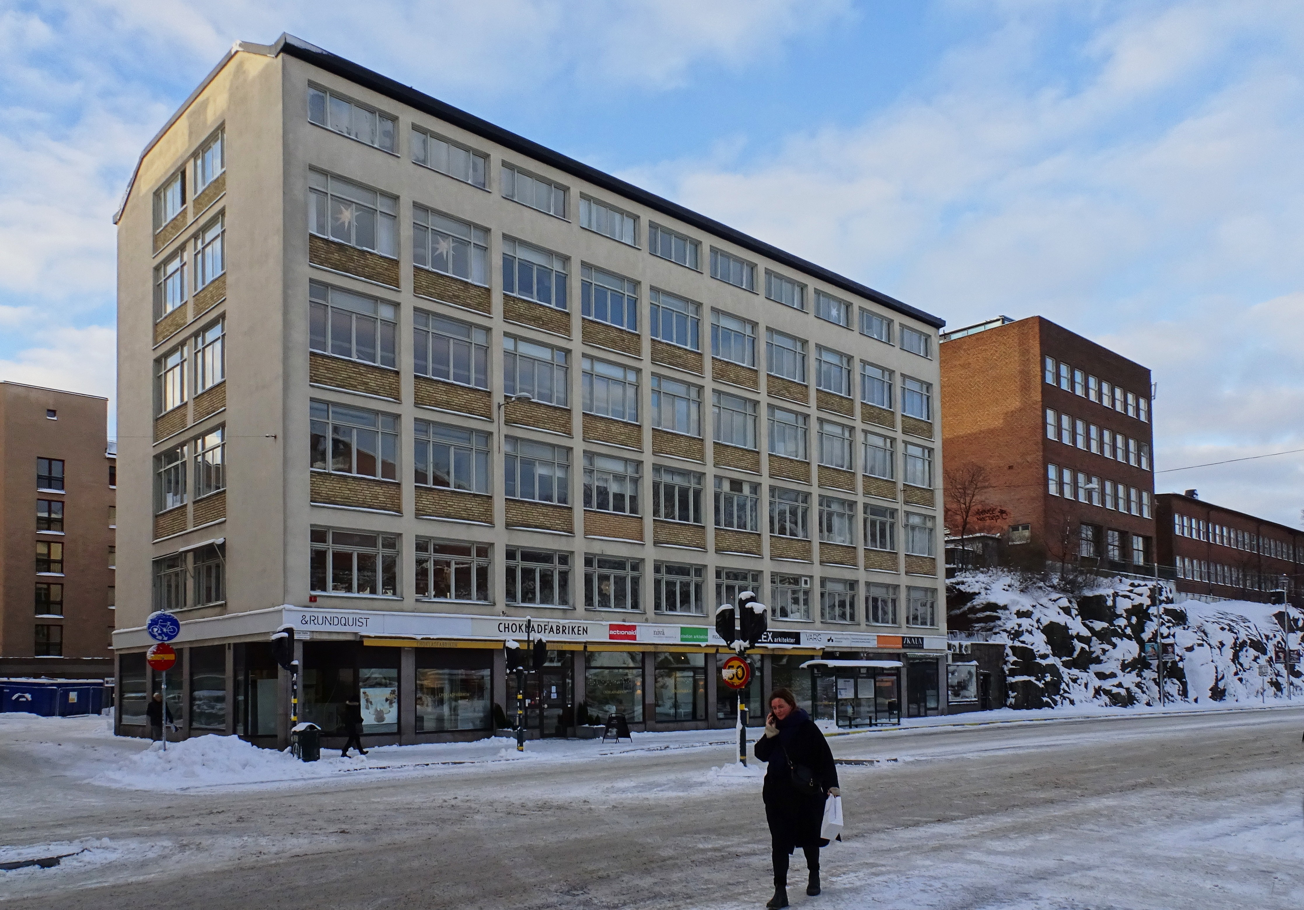 Verkstadsbyggnaden för Stockholms Hantverksförening, vy från Renstiernas gata. Arkitekt Robert Berghagen